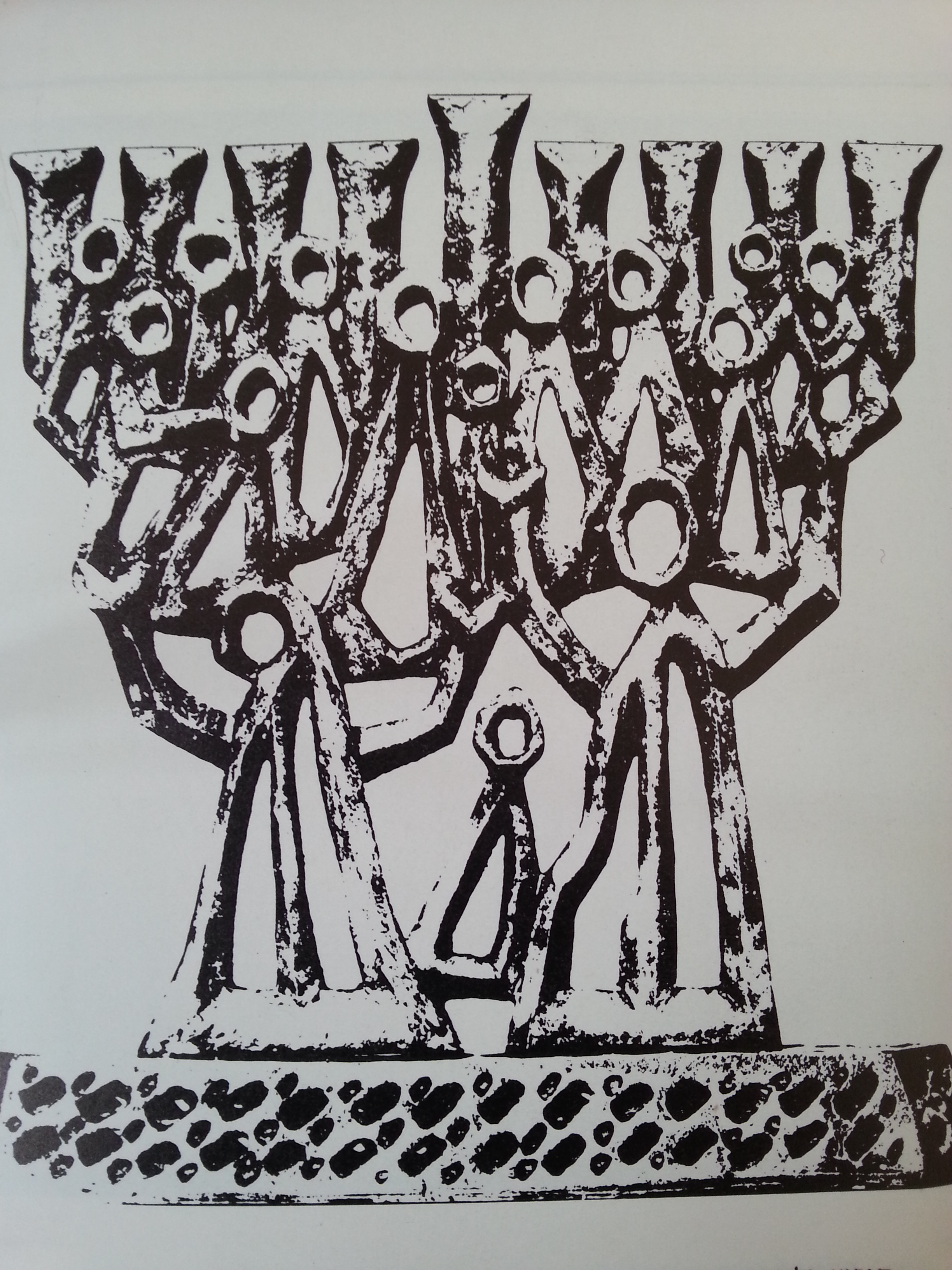 (חנוכיה, יציקת אלומיניום. יצירת האמן בנימין גליקמן. (ב. גליקמן